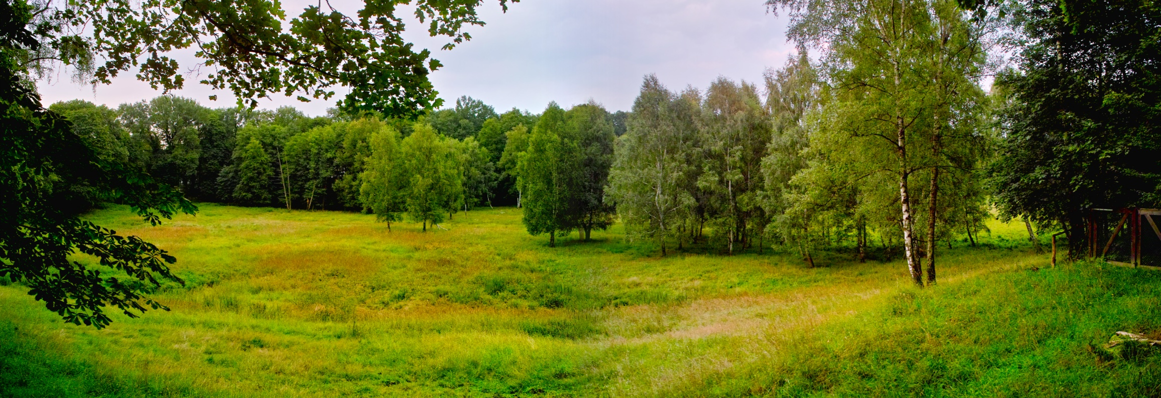 Grunewald, Berlin, Germany